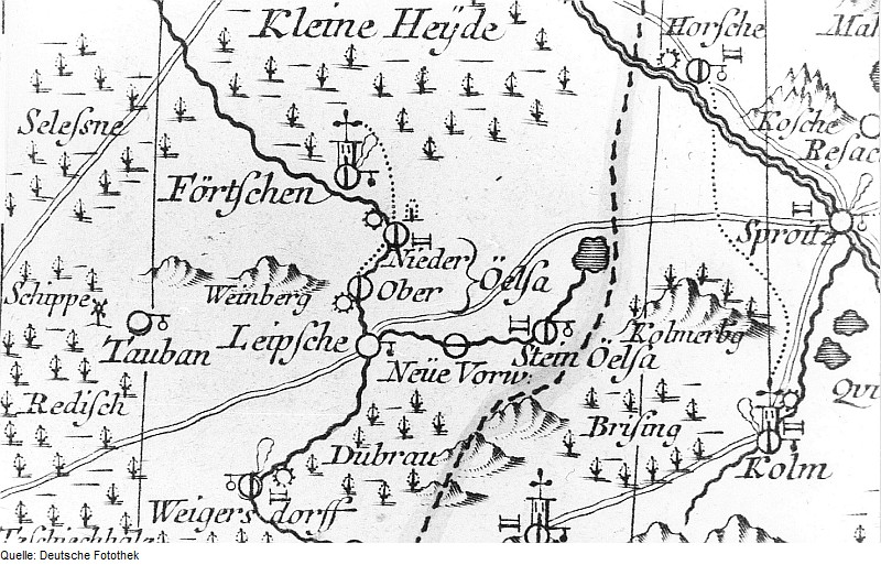 Original image description from the Deutsche Fotothek Mücka-Förstgen-Ost (vormals Ober- und Nieder Ölsa). Oberlausitzkarte, Schenk, 1759